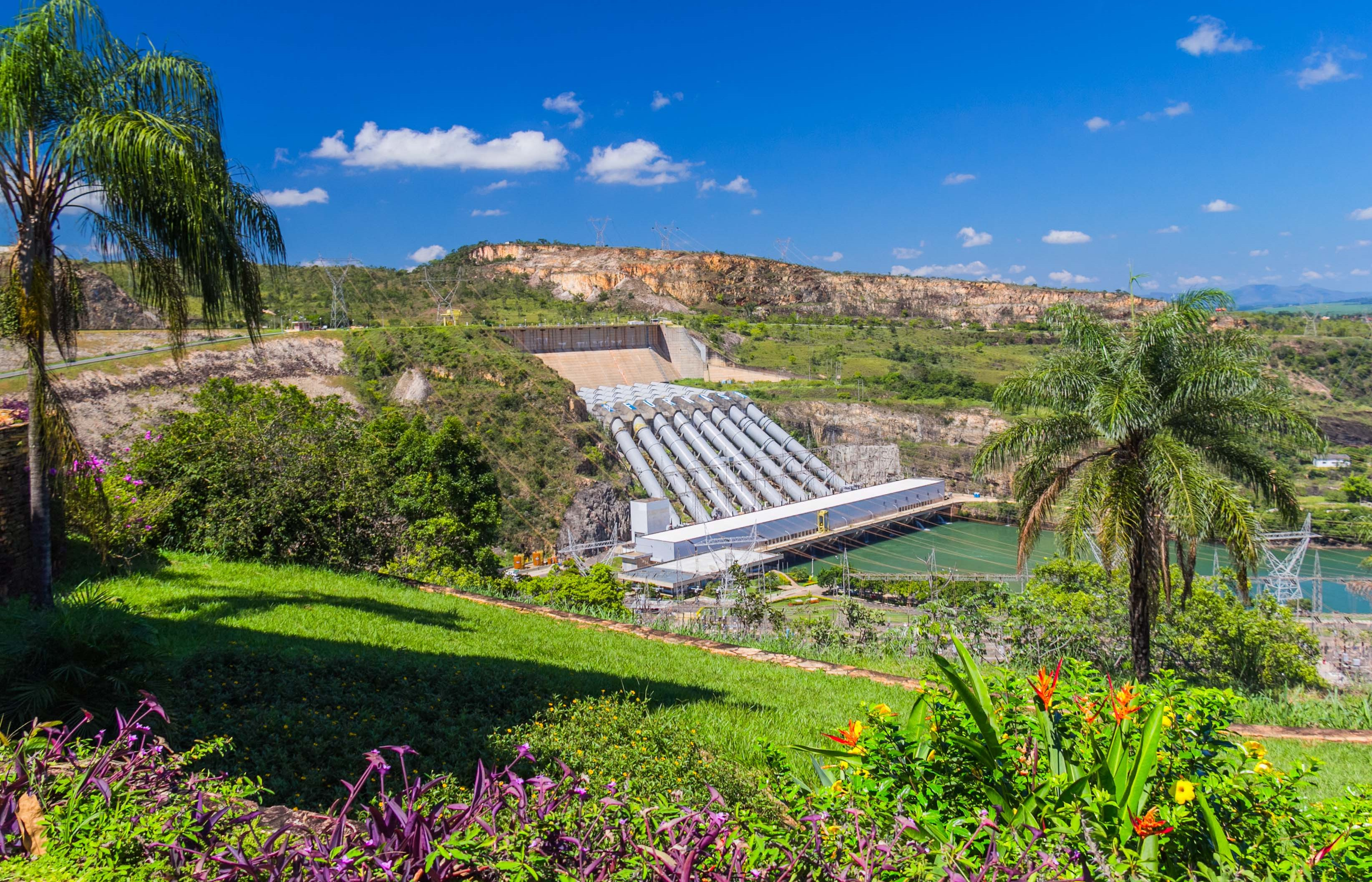 Panoramica das turbinas da hidroeletrica de Furnas,que ate ha alguns anos atras era a maior do pais e uma das maiores do planeta.